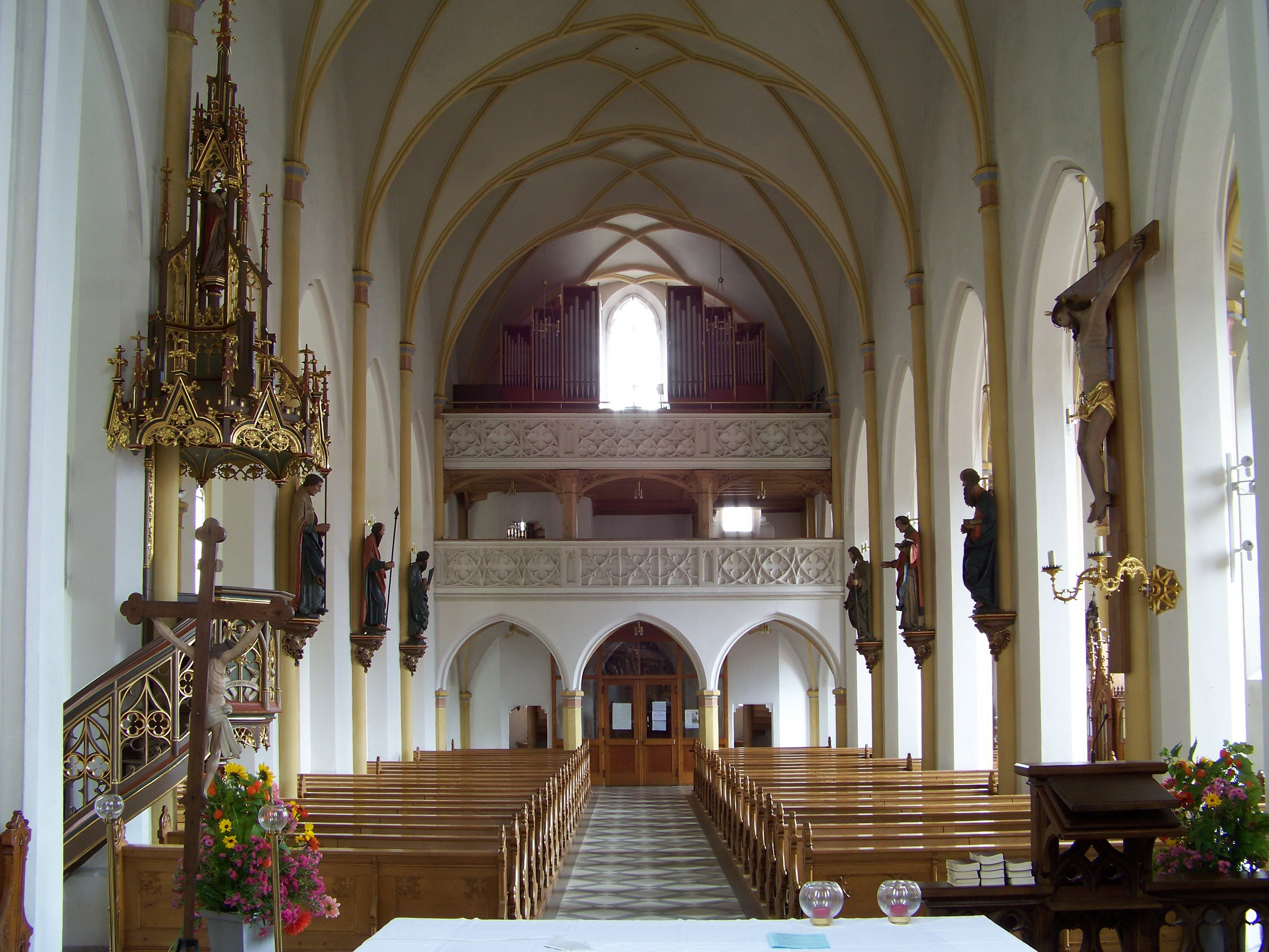 Rottenburg an der Laaber. Katholische Pfarrkirche St. Georg. Langhaus mit Kanzel und zweistöckiger Westempore.